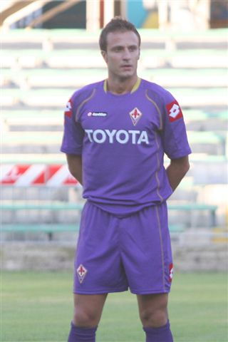 Il calciatore ritratto alla presentazione della nuova squadra allo stadio comunale di Firenze